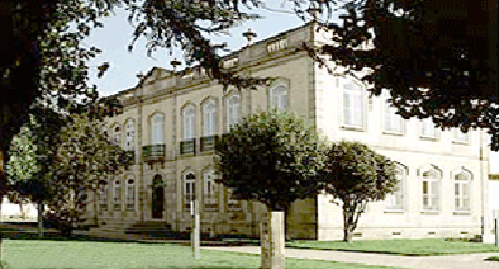 Palácio da Granja (1883), em Paredes (Portugal), dos viscondes de Paredes